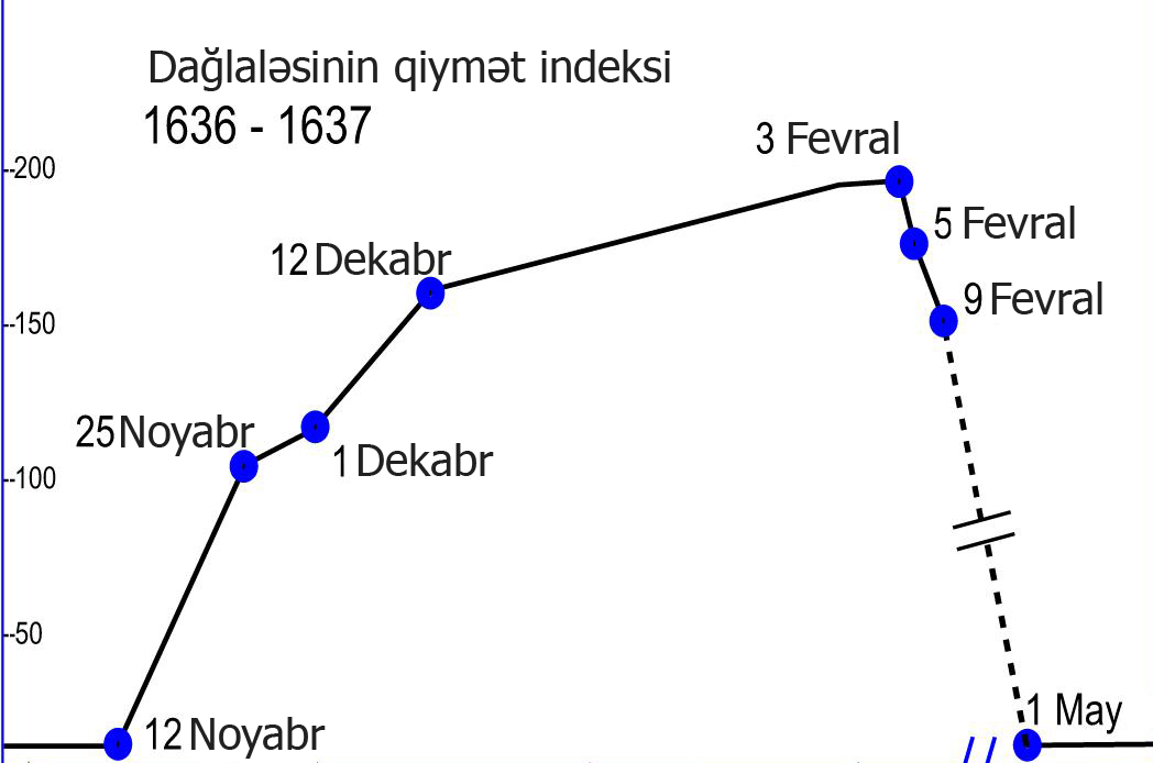 Dağlaləsinin 1636-1637-ci illər qiymət indeksi